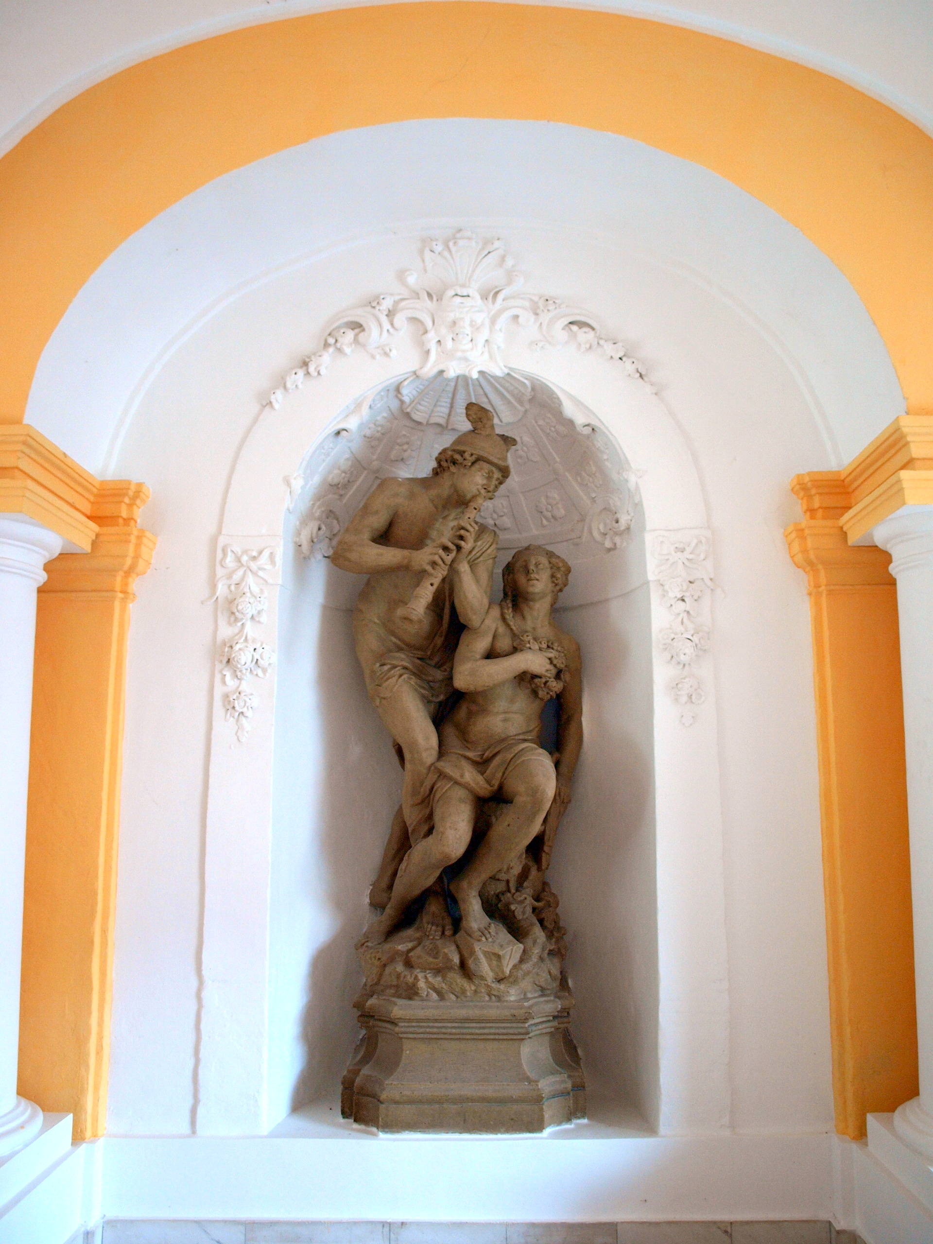 zámek ve Sloupu v Čechách